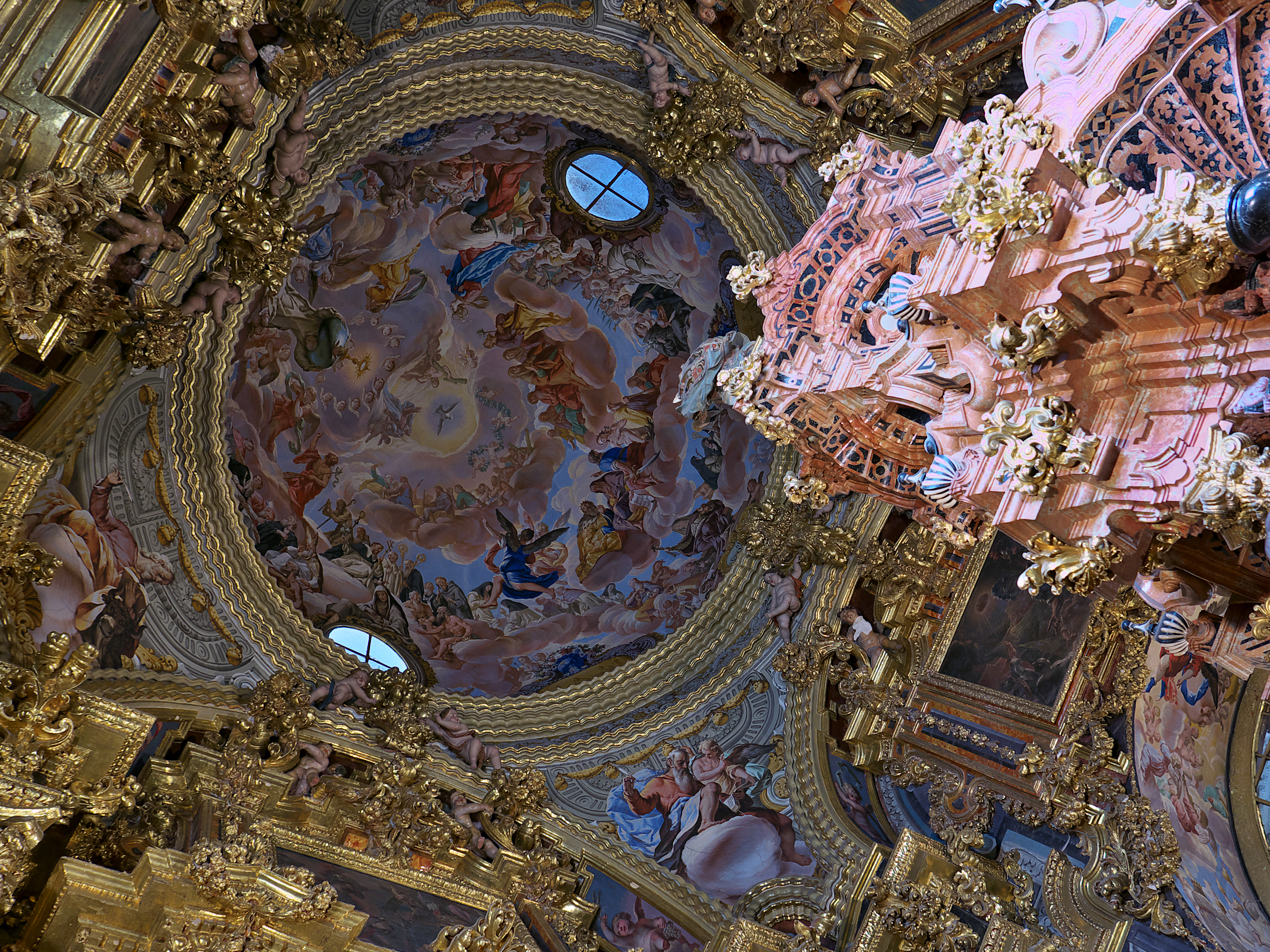 Antonio Palomino (1712), con la colaboración de José Risueño, expone en la bóveda del sagrario de la cartuja a San Bruno y la Iglesia Militante como triunfo de Cristo en la Eucaristía.